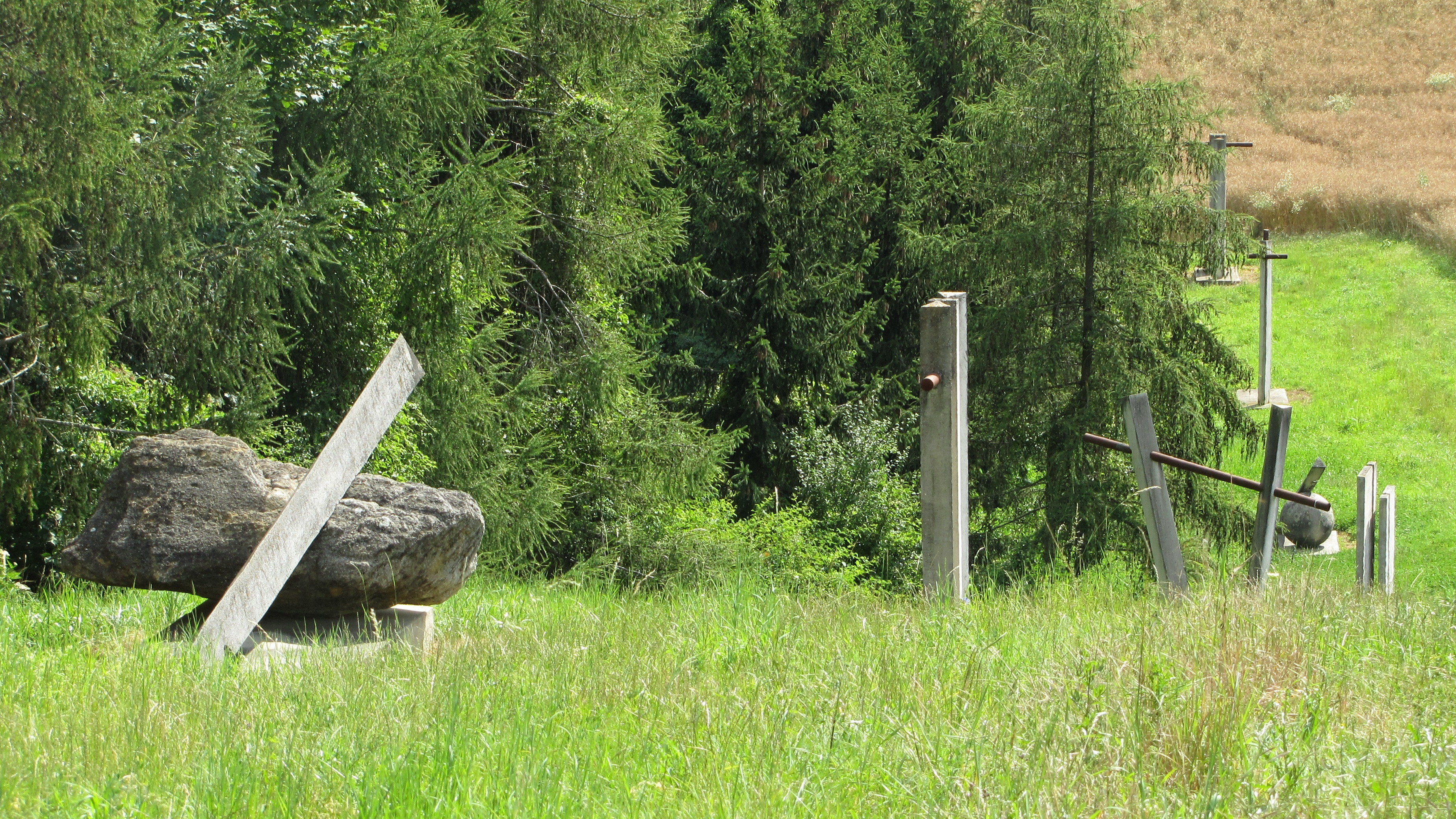 Křížová cesta v Bukovanech